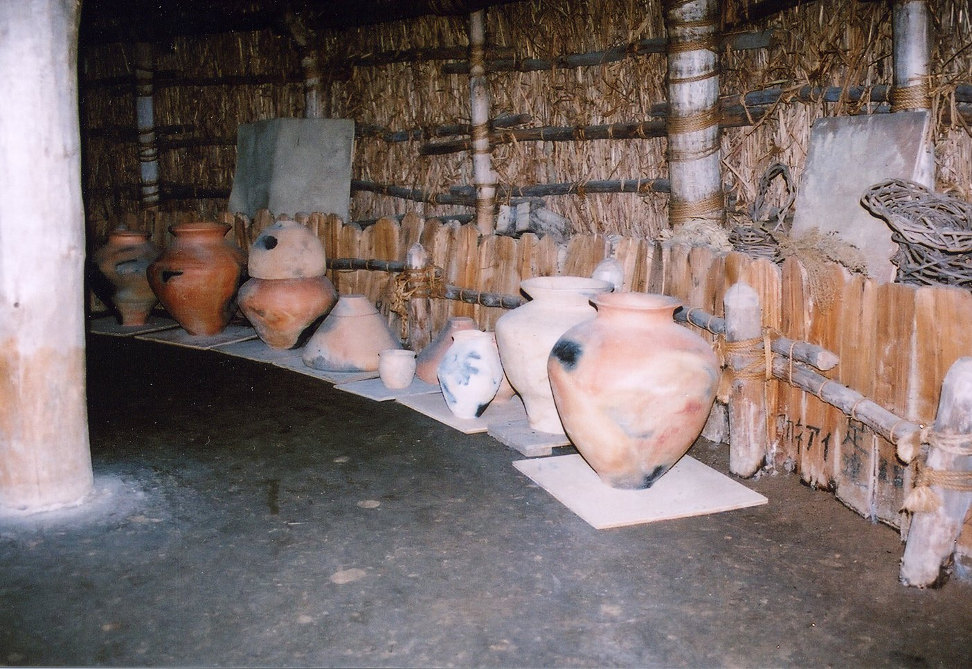 復元された地蔵田遺跡（住居内部と市民の手づくり土器）